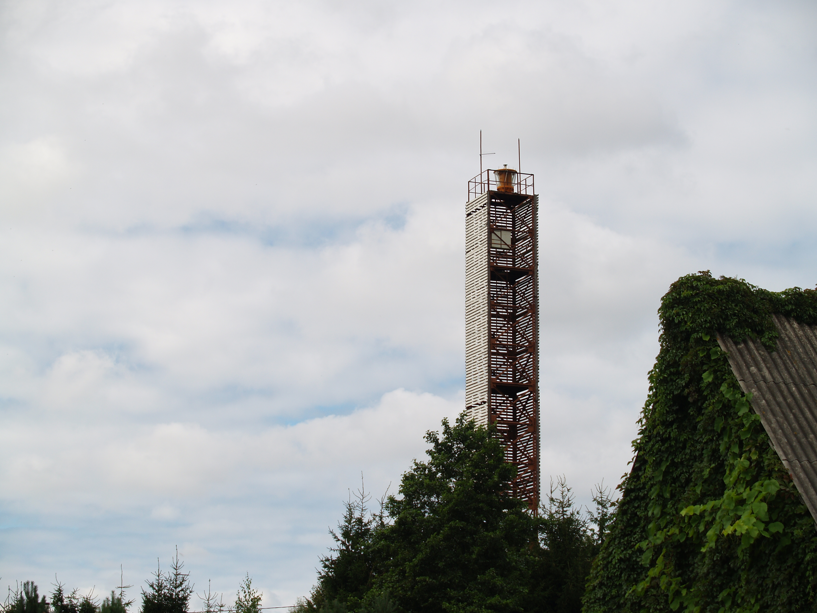 Häädemeeste tulepaak